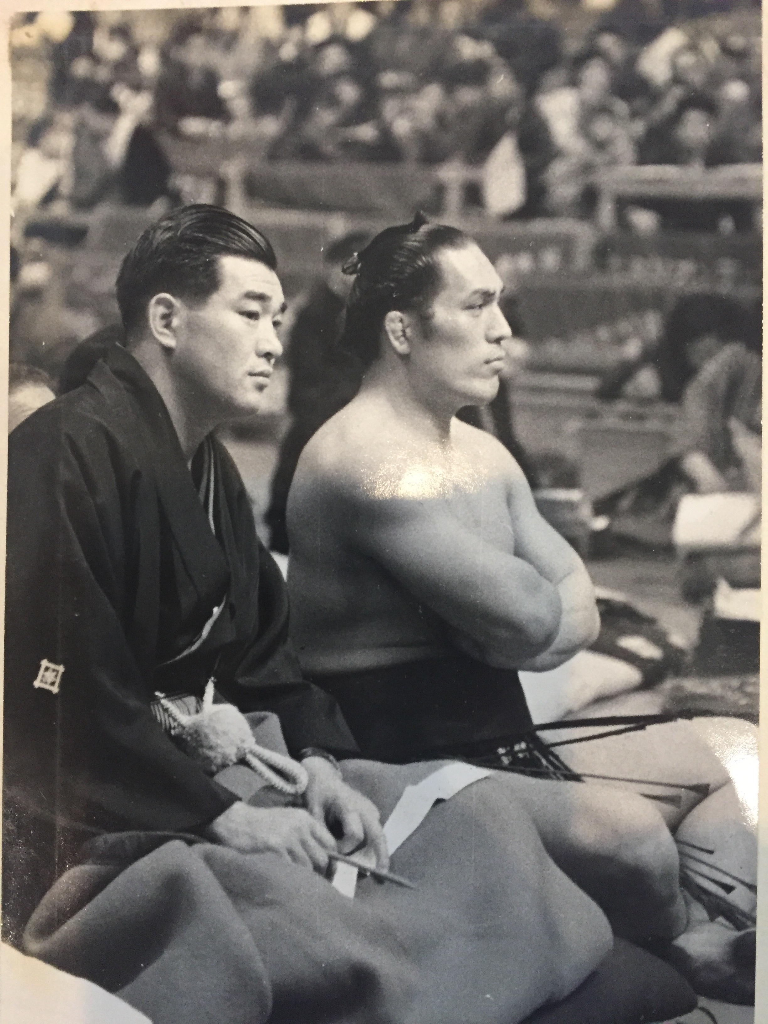 土俵際に並ぶ親方と関取